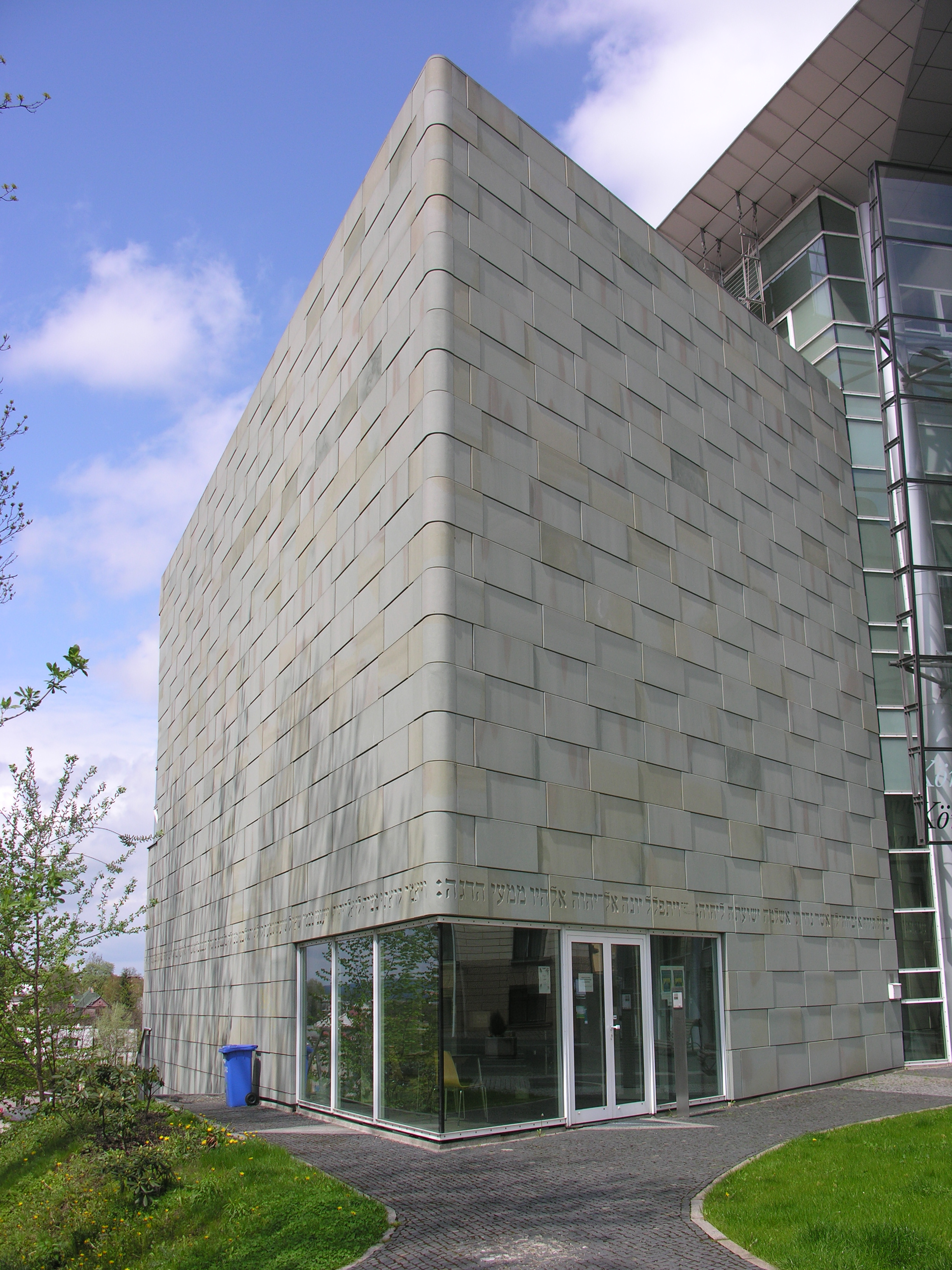 Nowa synagoga w Libercu